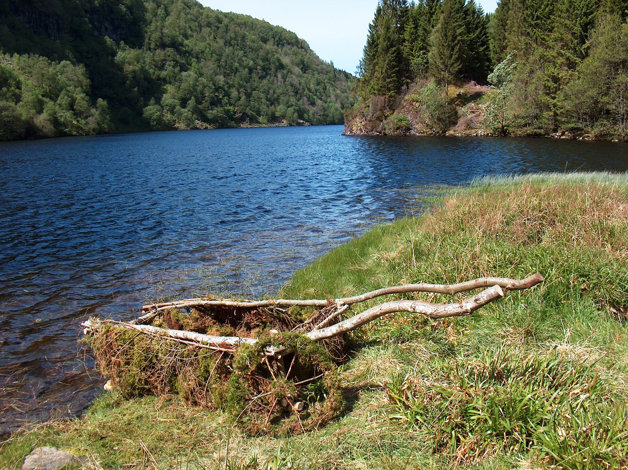 Kossdalsvatnet